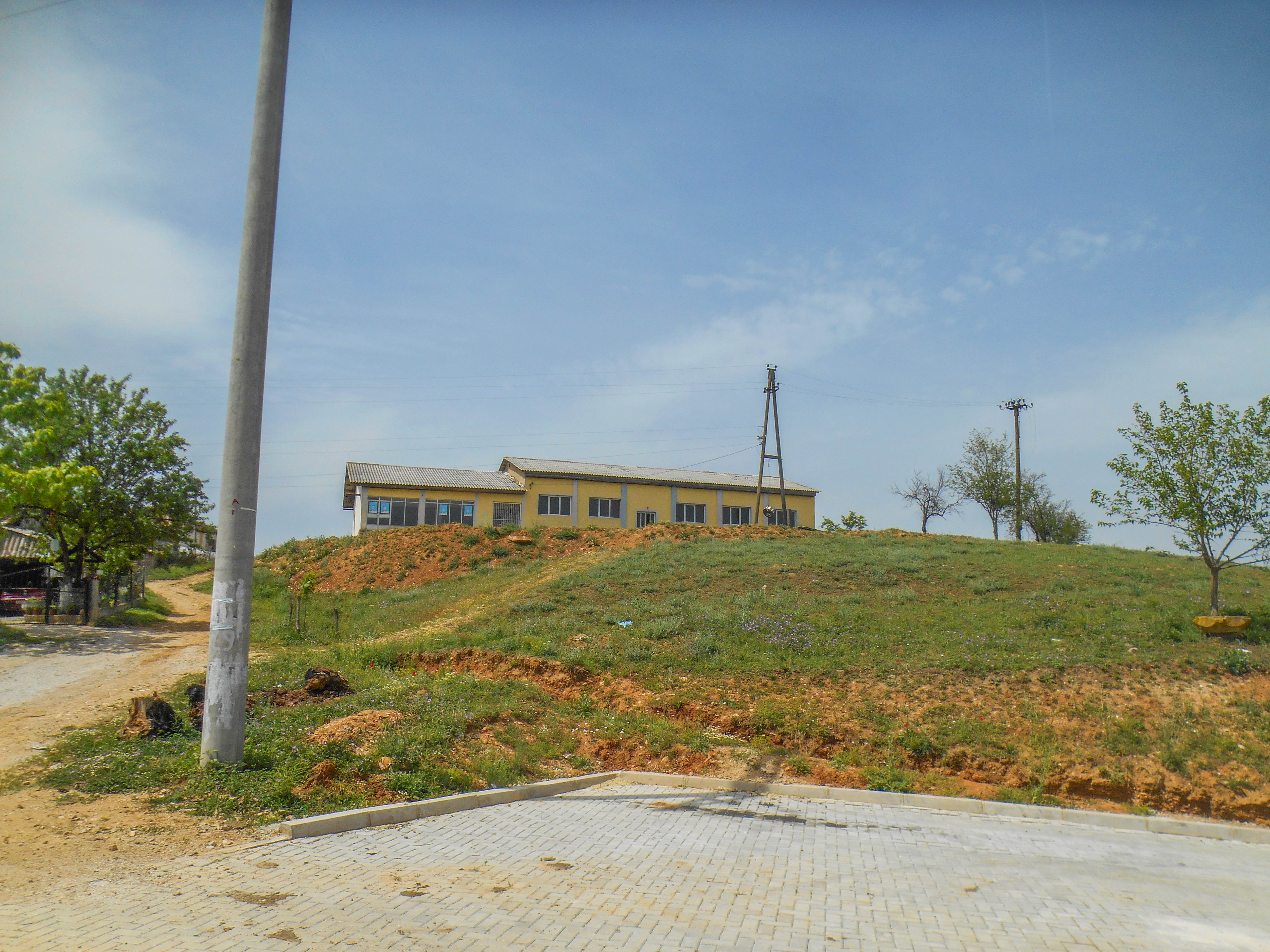 Дом на култура - Радичево